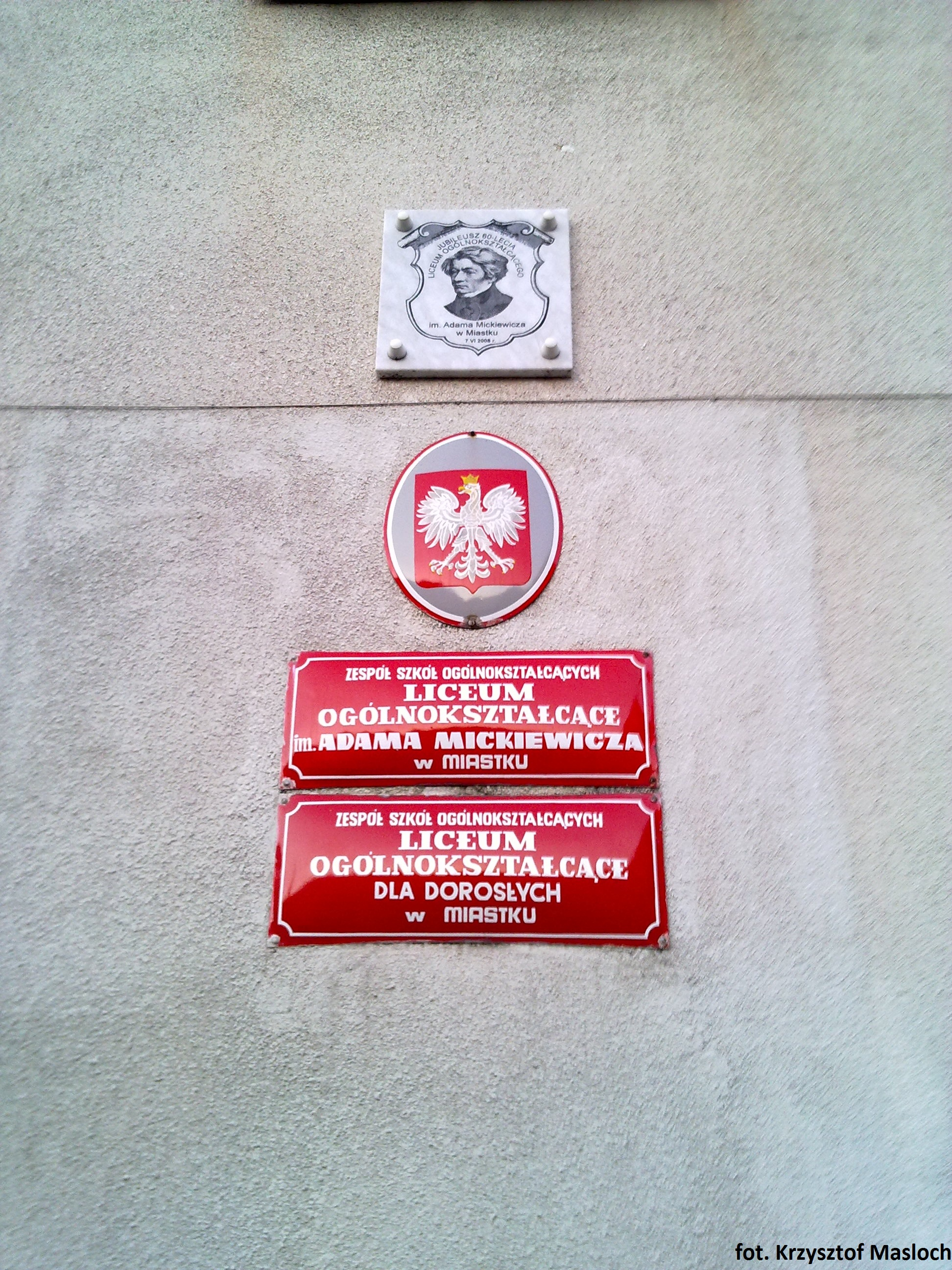 Liceum Ogolnoksztalcace im Adama Mickiewicza w Miastku